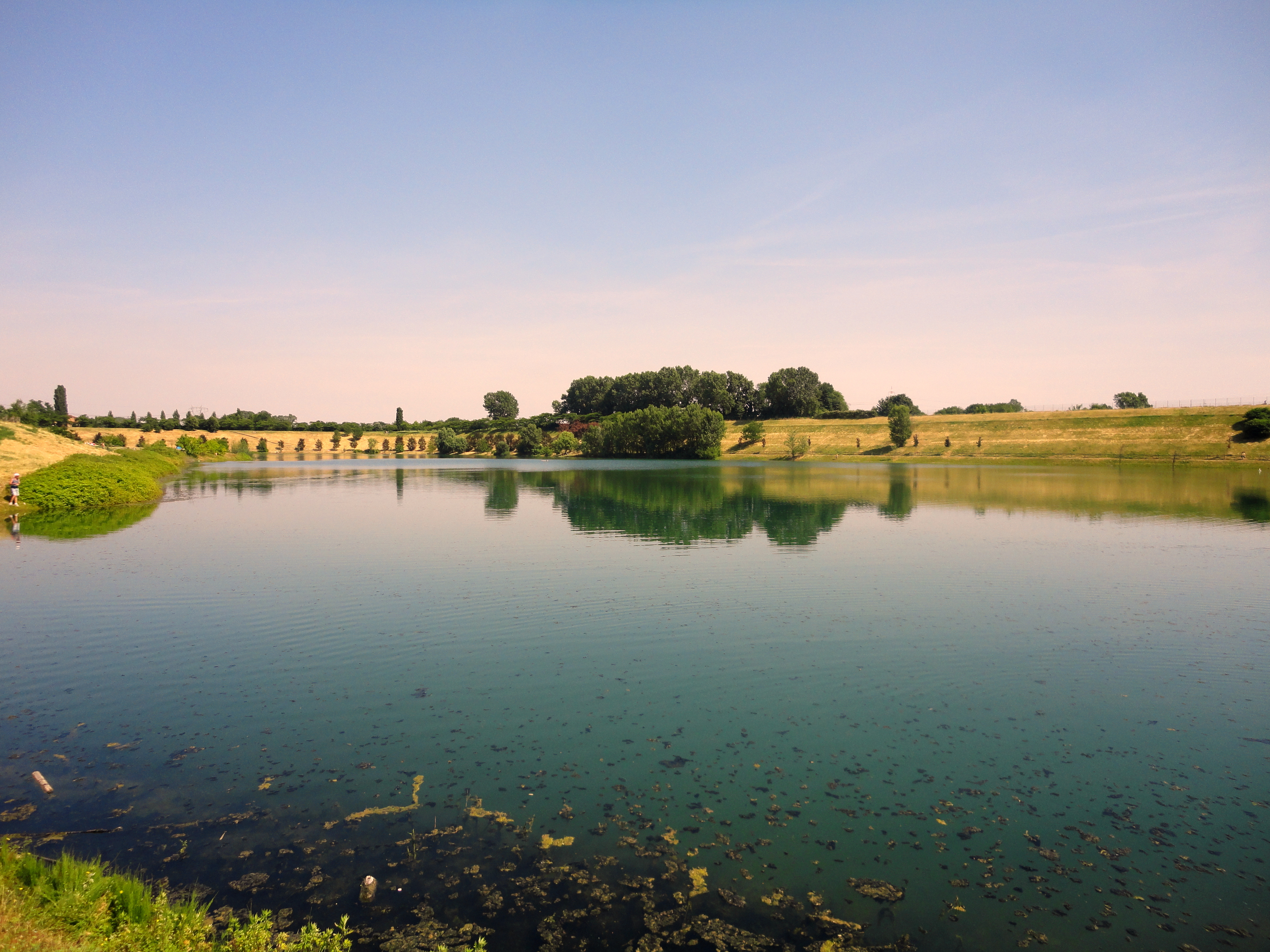 Parco Increa This is a photo of a monument which is part of cultural heritage of Italy.